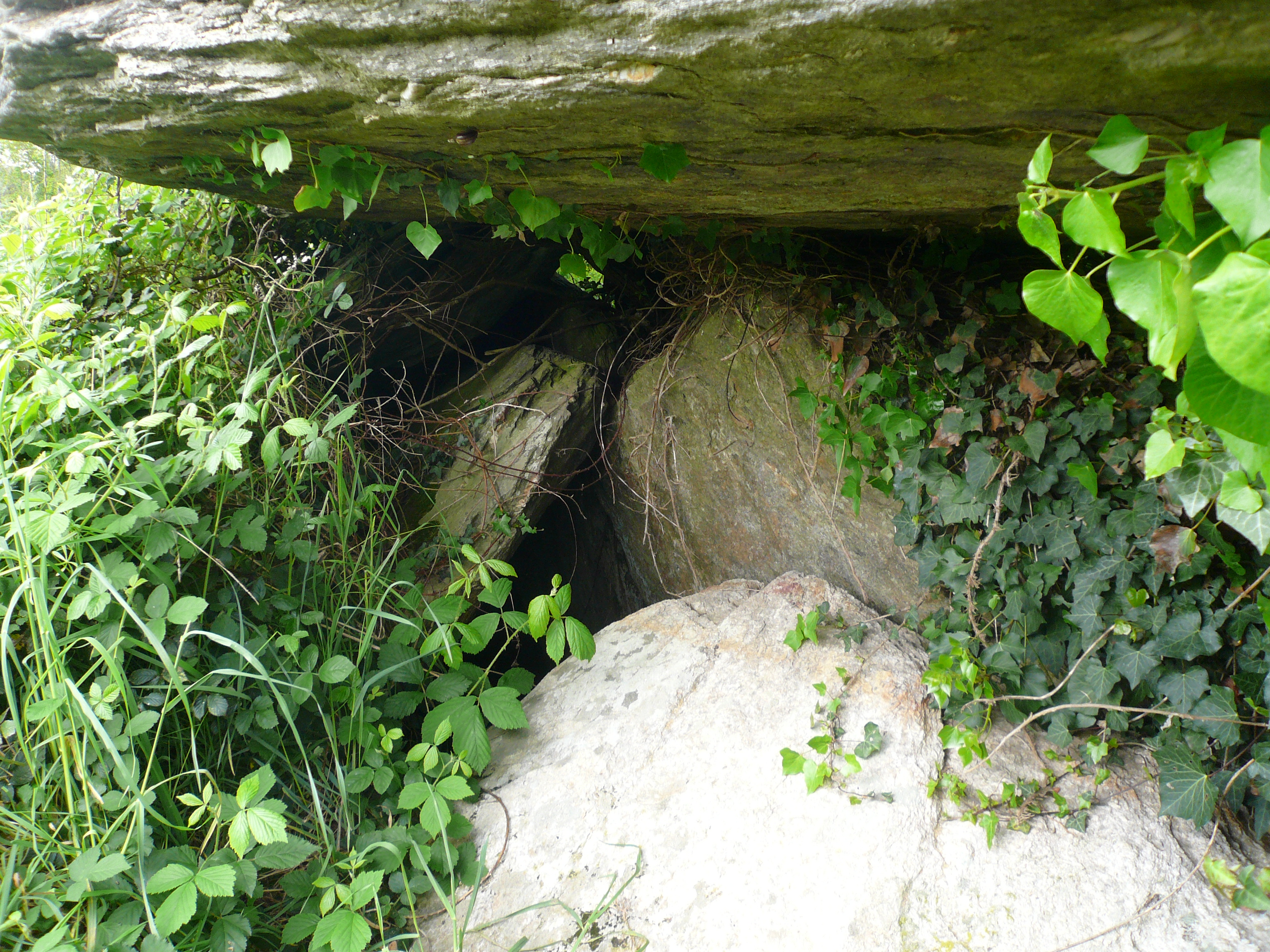 Vue de l'intérieur de l'allée couverte de Loc'h ar Pont (dite « Ti ar c'horrikaned ») en Melgven, Finistère, Bretagne, France.